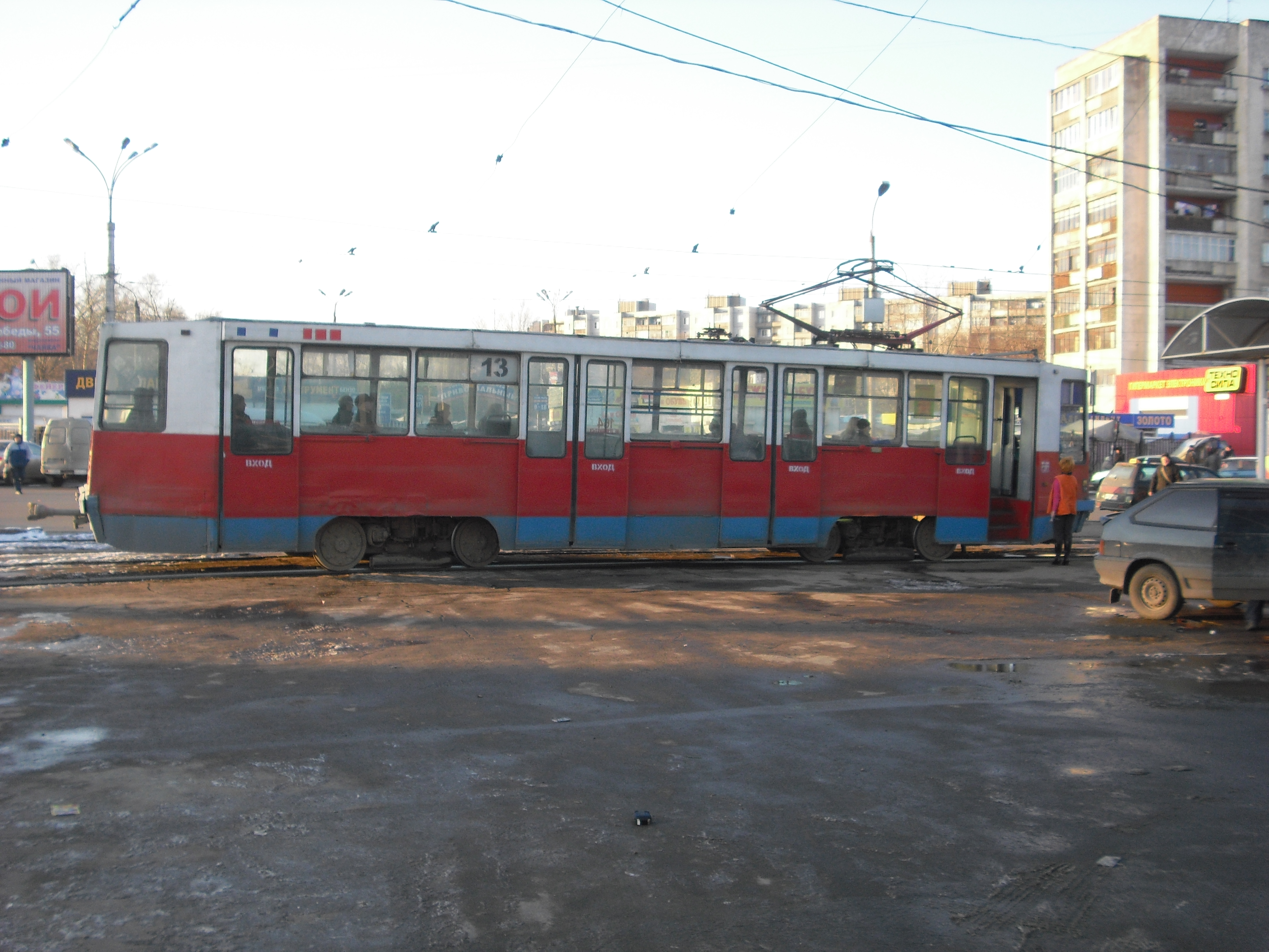 Трамвай в Твери